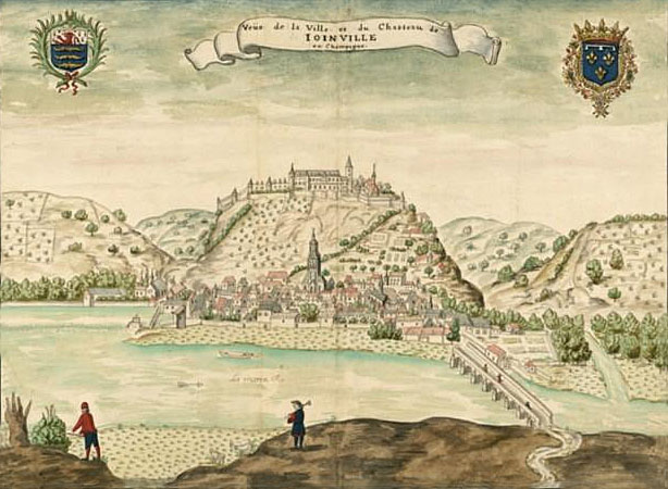 Veüe de la Ville et du Chasteau de Ioinville en Champagne